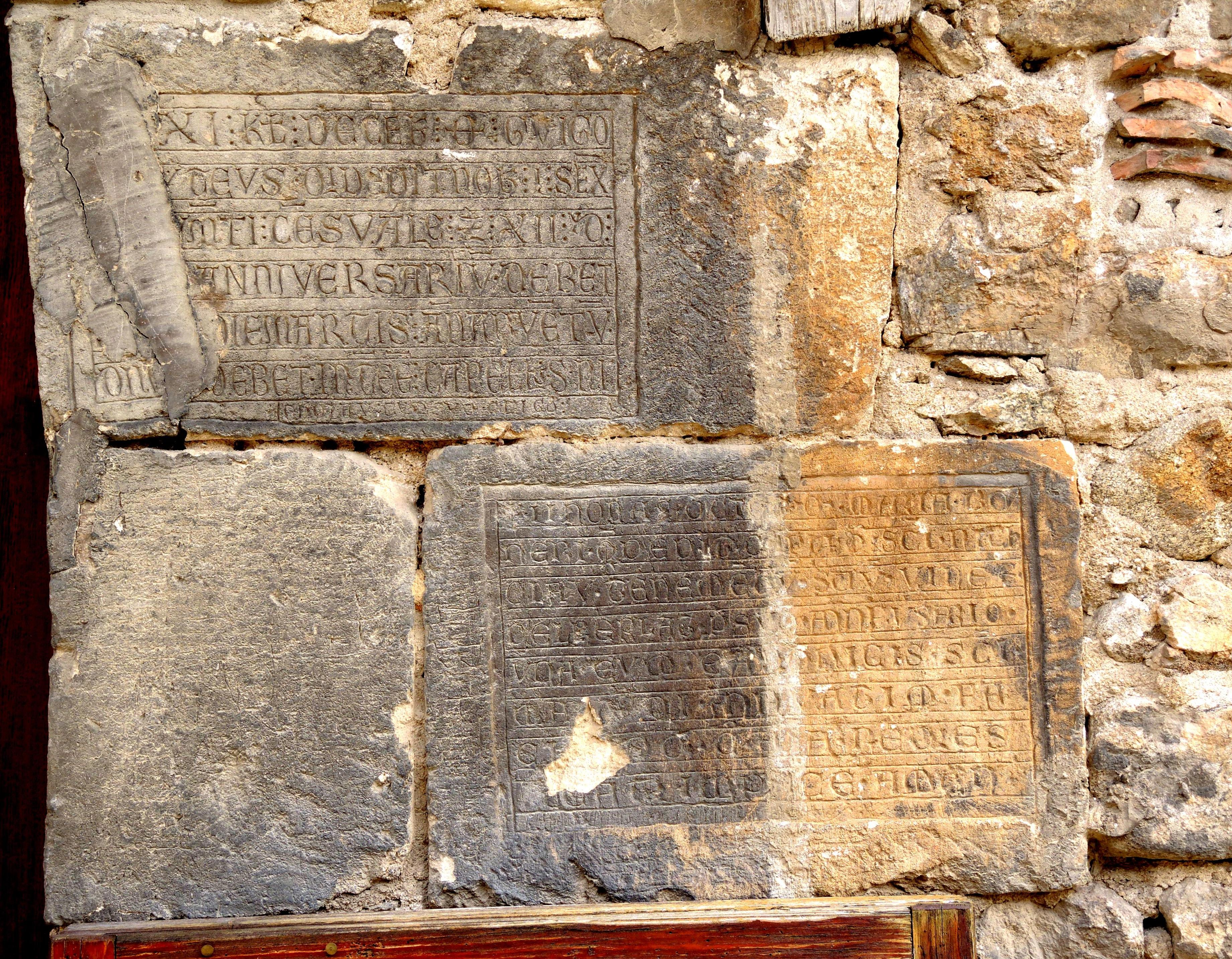 Peyraud détail